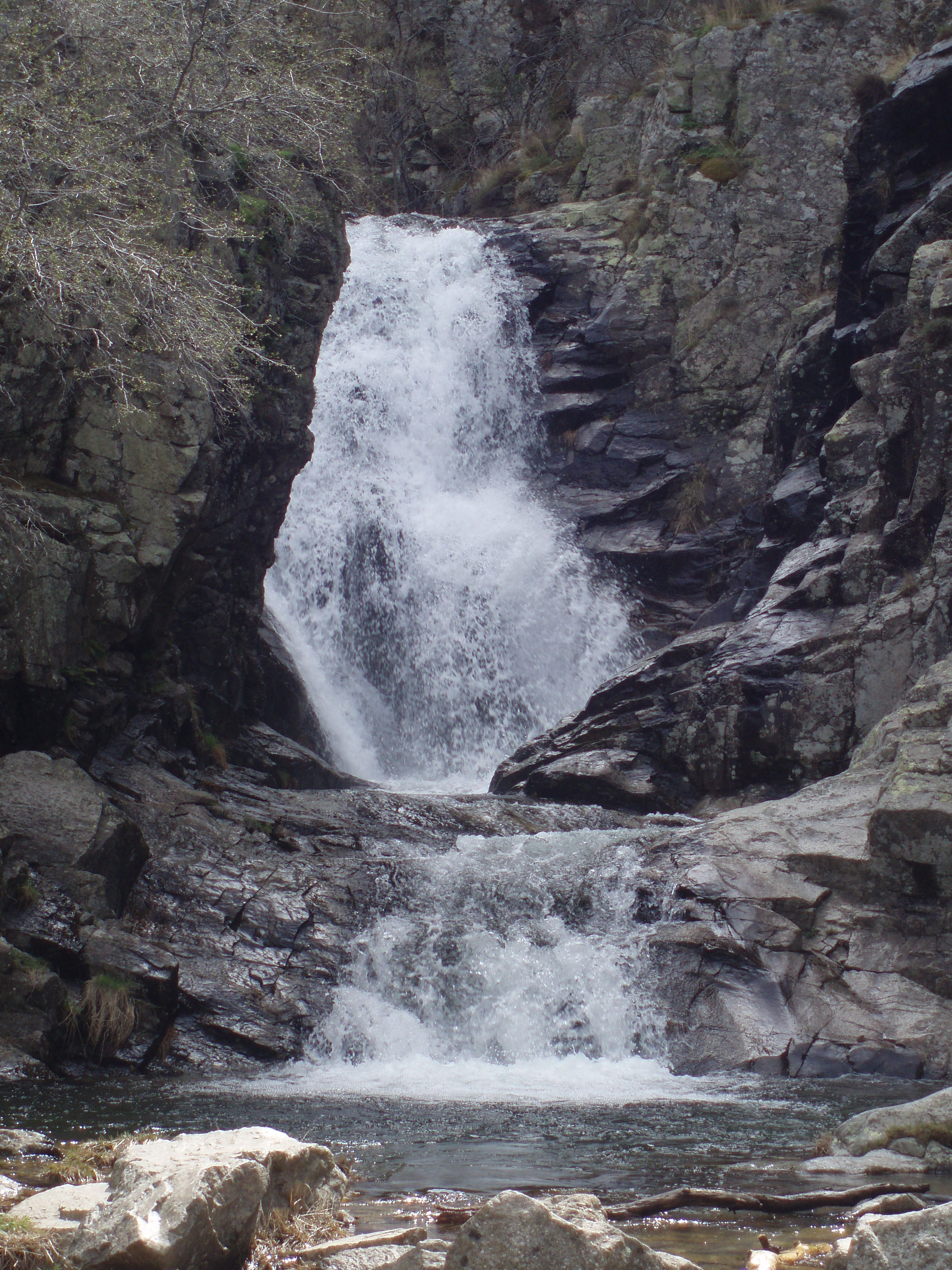 Cascadas del Purgatorio (Sierra de Guadarrama, España).